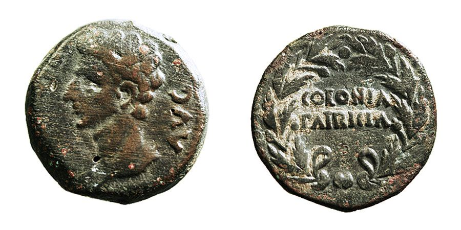 As de bronce acuñado en la ciudad romana de Colonia Patricia, nombre de la actual Córdoba (España) durante el Alto Imperio Romano. En el reverso muestra una inscripción con el nombre de la ciudad.